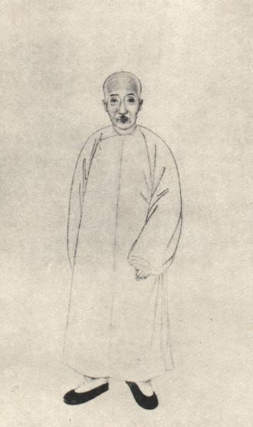 清代学者。Pan Zuyin